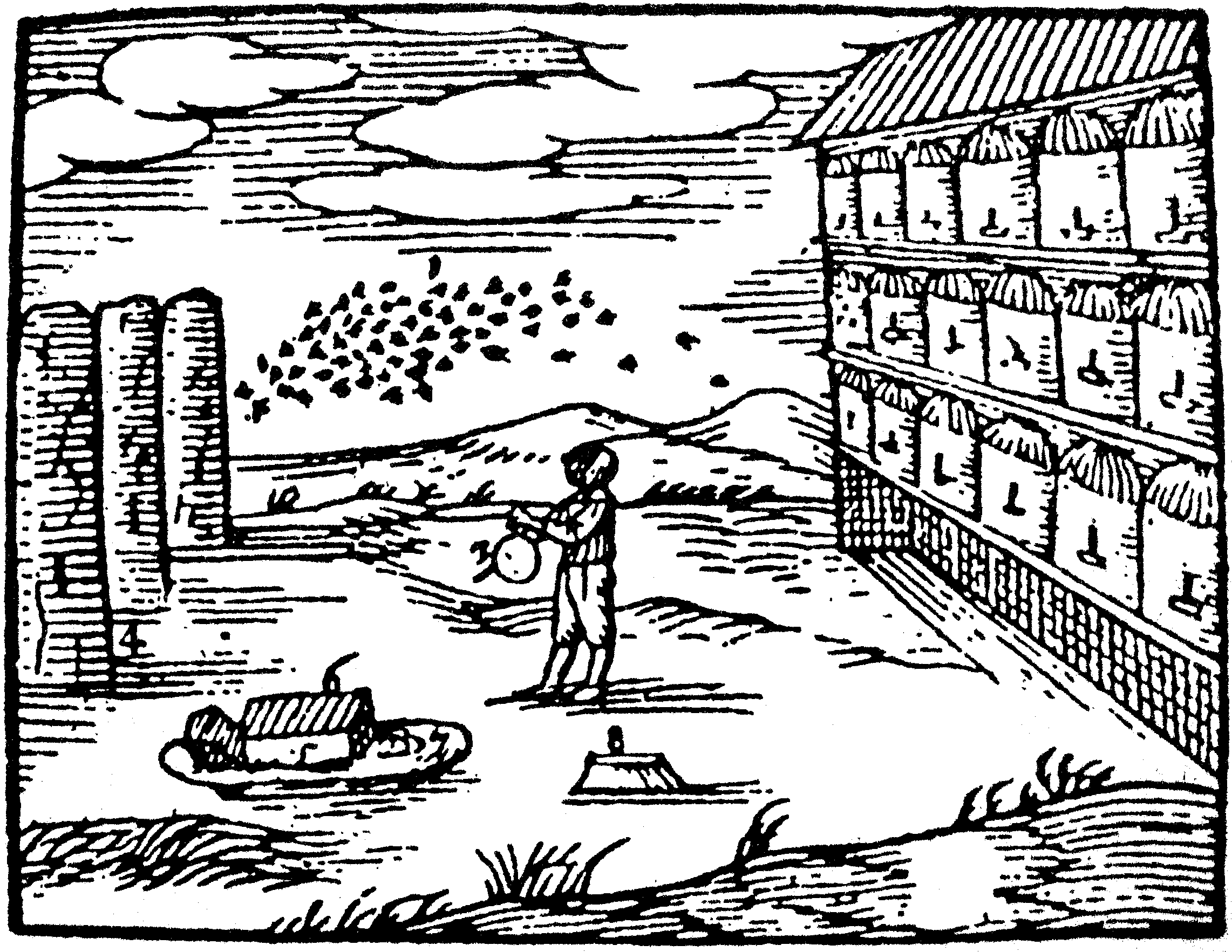 Chov včel v druhé polovině 17. století; Jan Amos Komenský: Veškeré spisy, sv. X